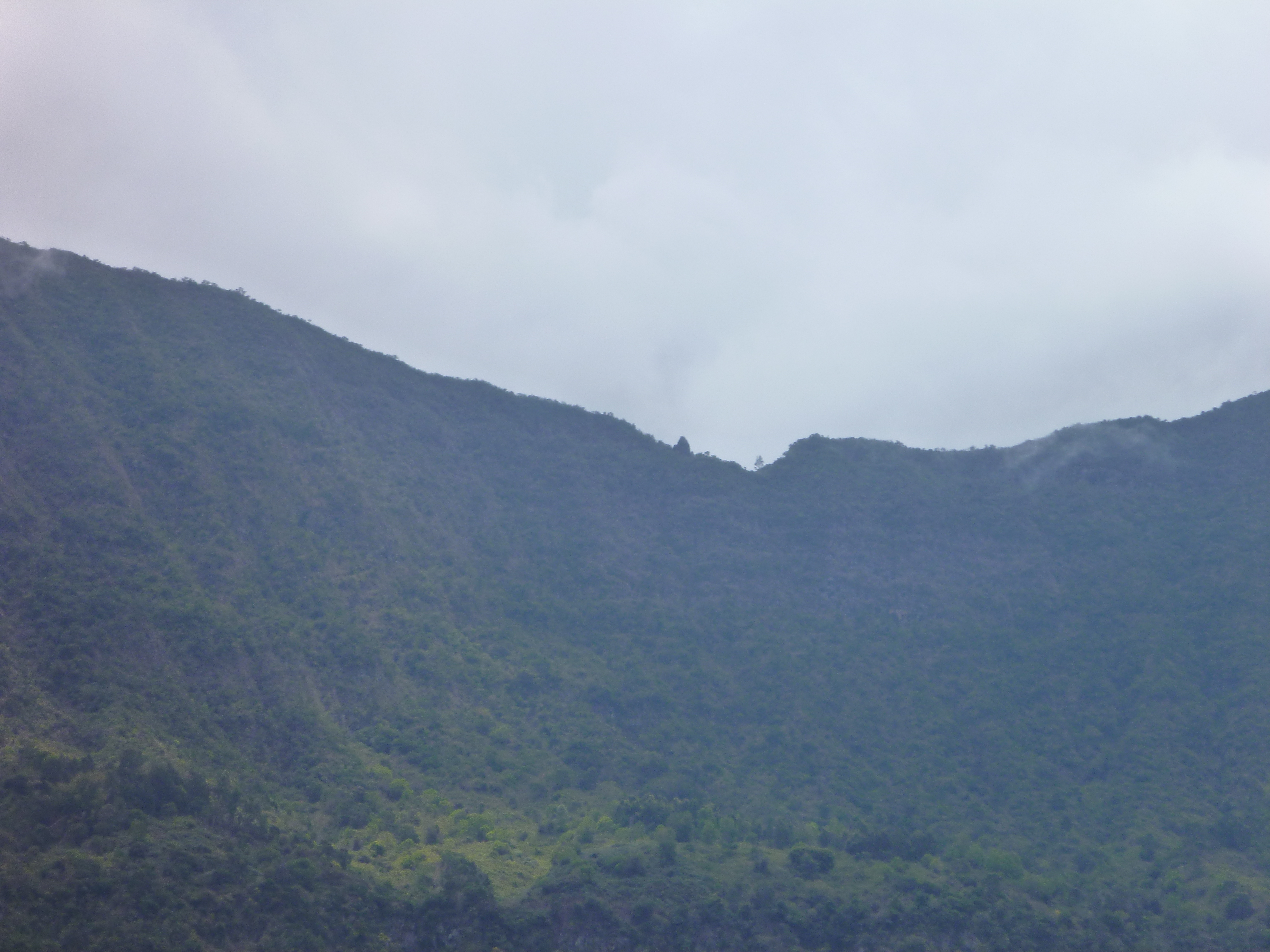 La Roche Verre Bouteille vue depuis la canalisation des Orangers